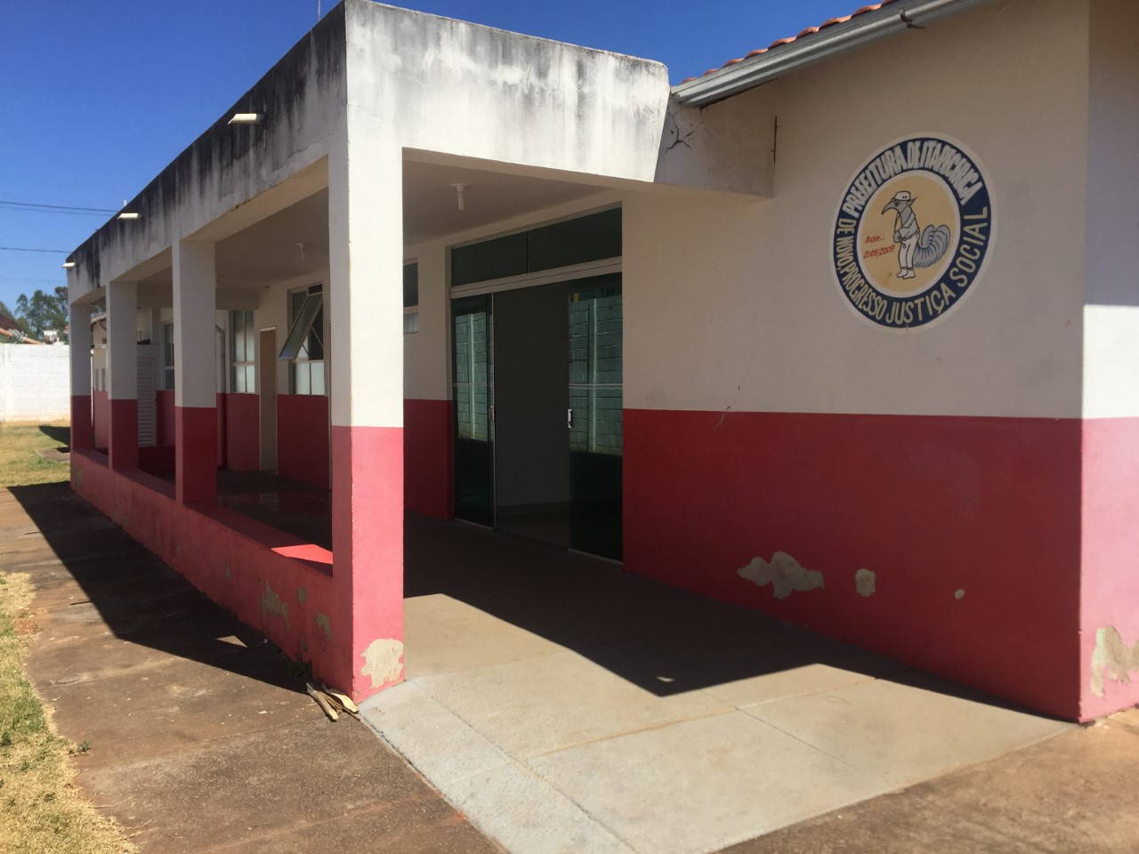 Unidade de apoio à UBS Bom Jesus, inaugurada em 2009.